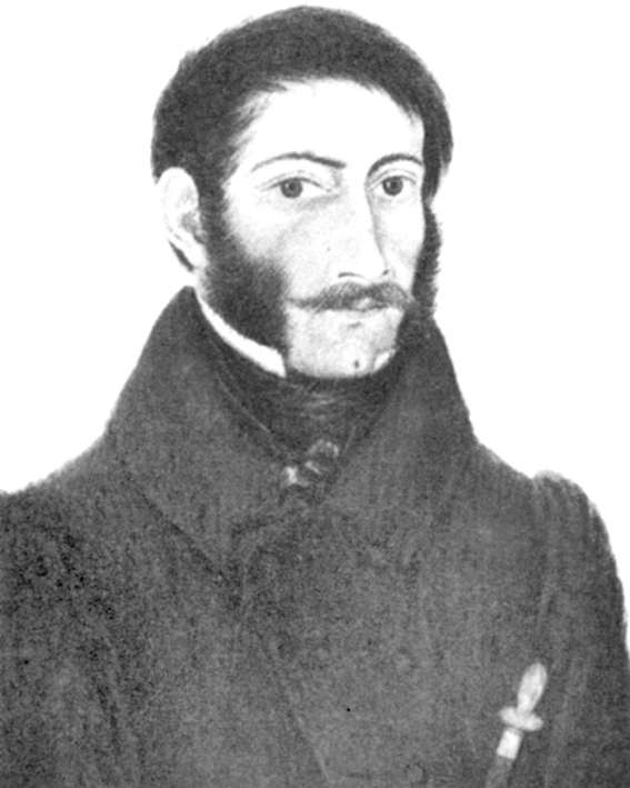 Адольф Янушкевіч ў Ішыме, малюнак Ю.Краеўскага